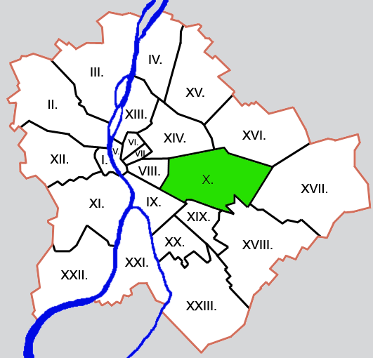 Budapest kerületei: X. kerület